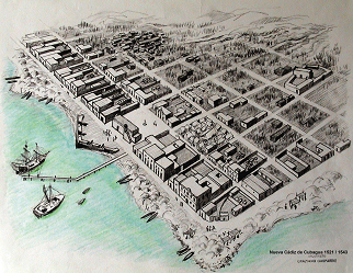 boceto de la reconstruccion urbana de como pudo ser la ciudad de Nueva cadiz de Cubagaua en 1523